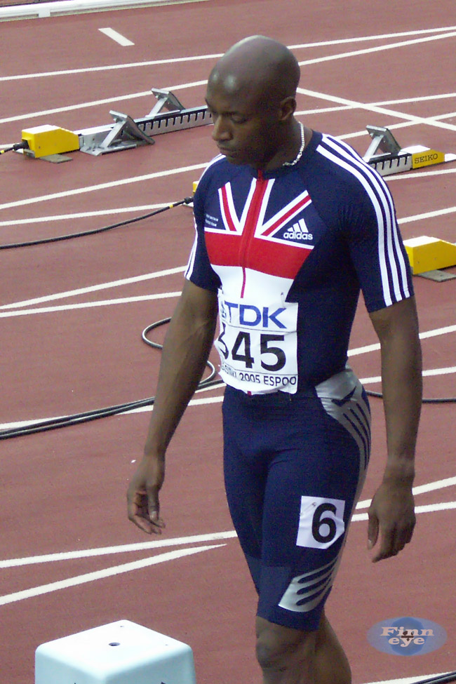 Marlon Devonish (GBR) World championships Helsinki 2005. Mise en ligne le 25 juillet 2007